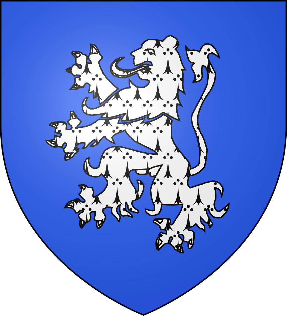 Drapeau de la province de la Bresse